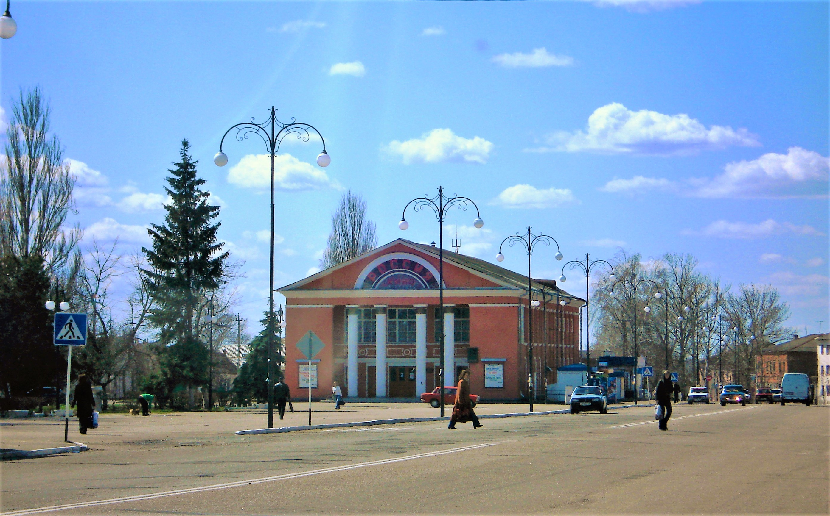 Главная площадь Обояни